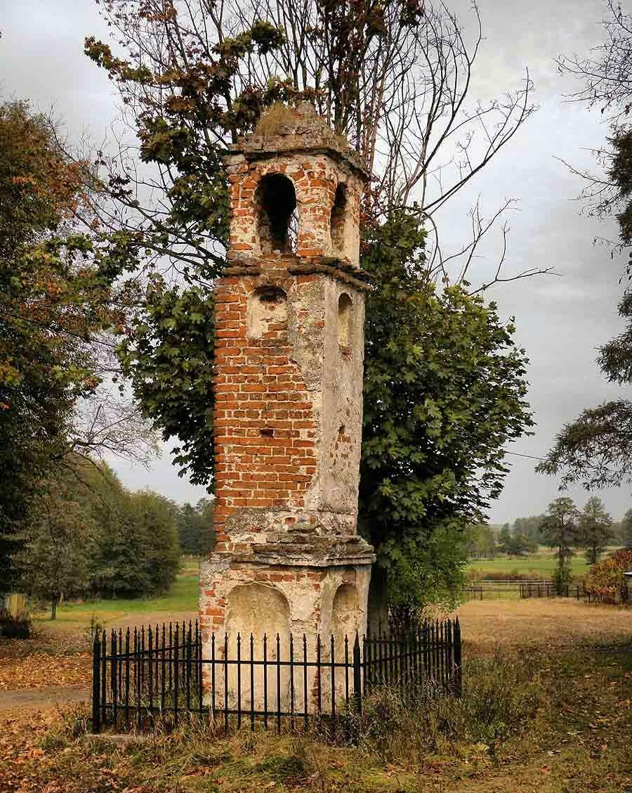 Zabytkowa kapliczka słupowa pozbawiona symboli religijnych.